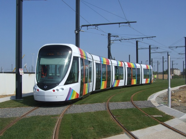 Une rame du tramway angevin flambant neuve au Centre de Maintenance d'Angers-Nord.